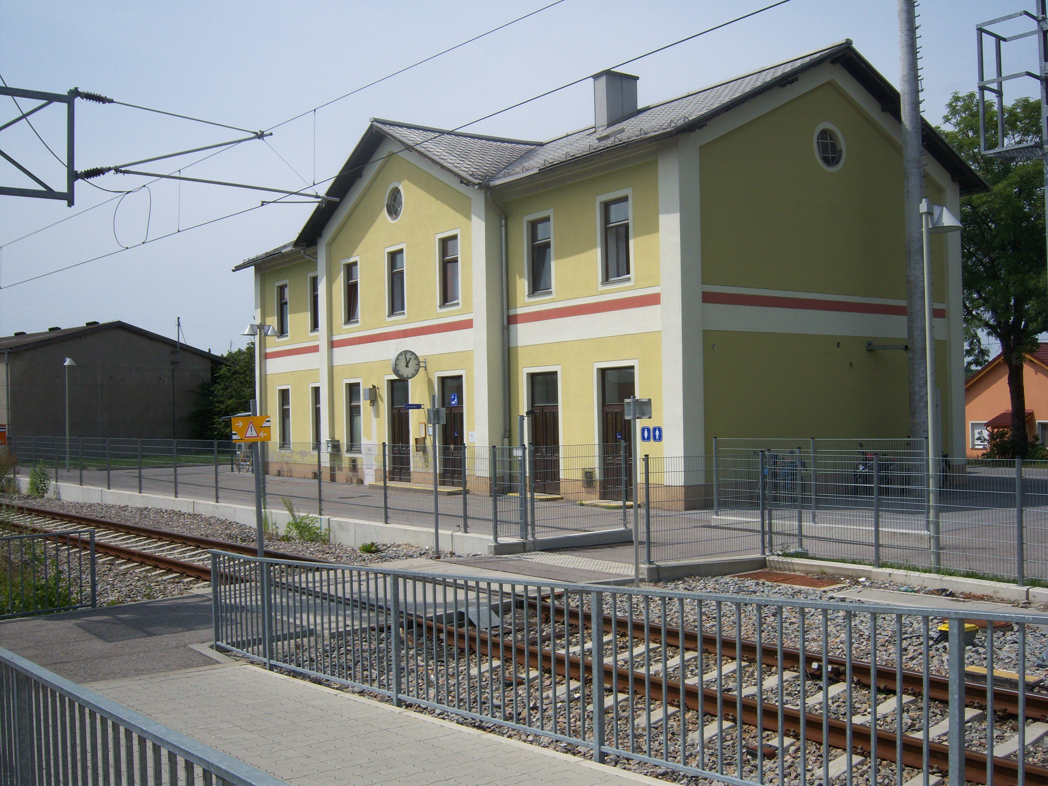 Bahnhof Ladendorf